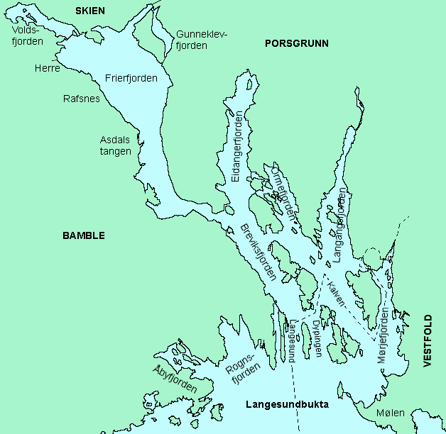 Frierfjorden, Telemark, Norway